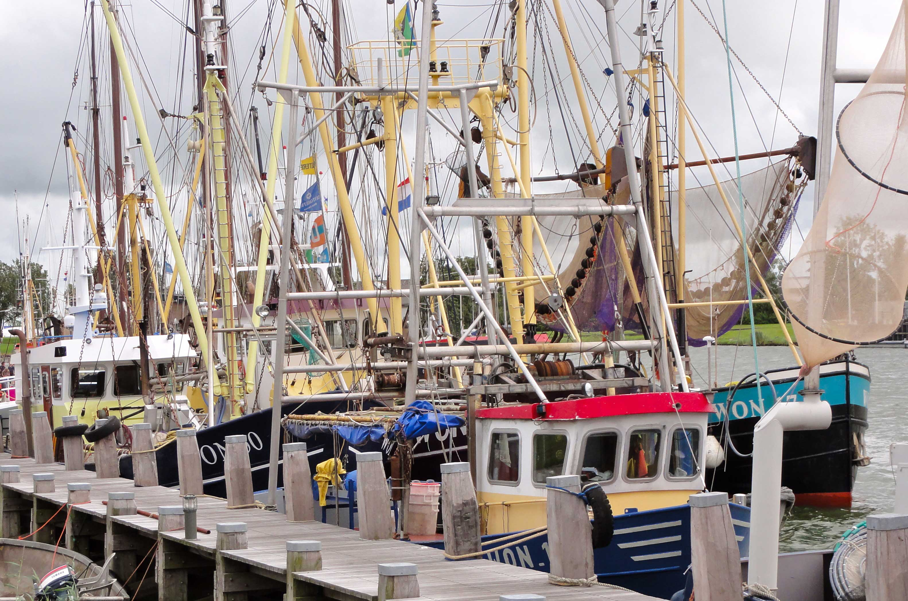 Vissershaven van Makkum